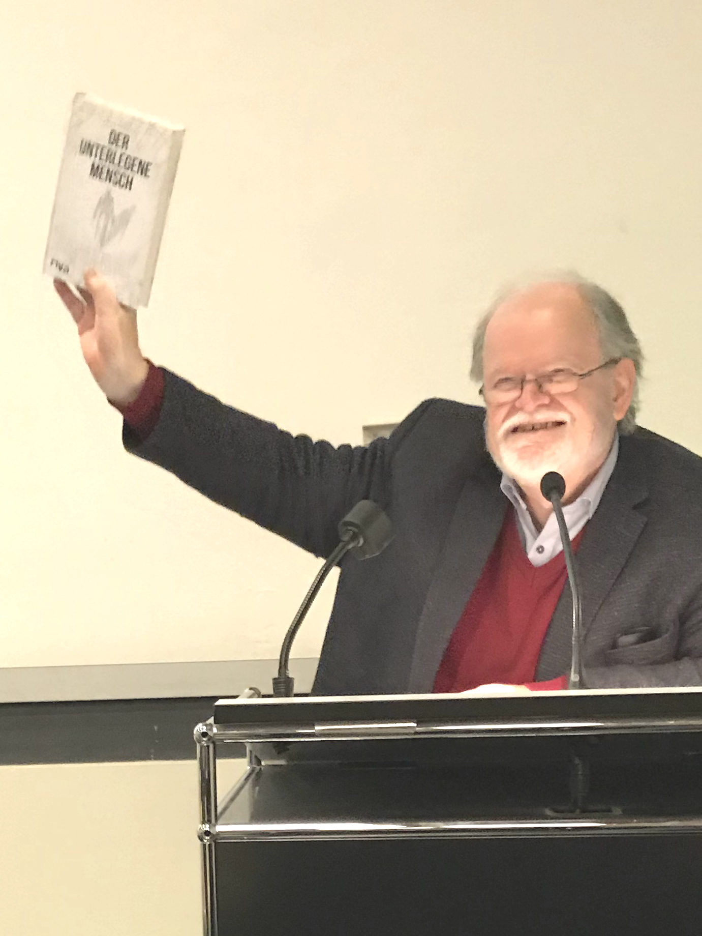 Werner Frick (Germanist), Universität Freiburg im Breisgau bei der Vorstellung von Armin Grunwald zu dessen Vortrag: Machen wir uns mit der Digitalisierung selbst überflüssig?